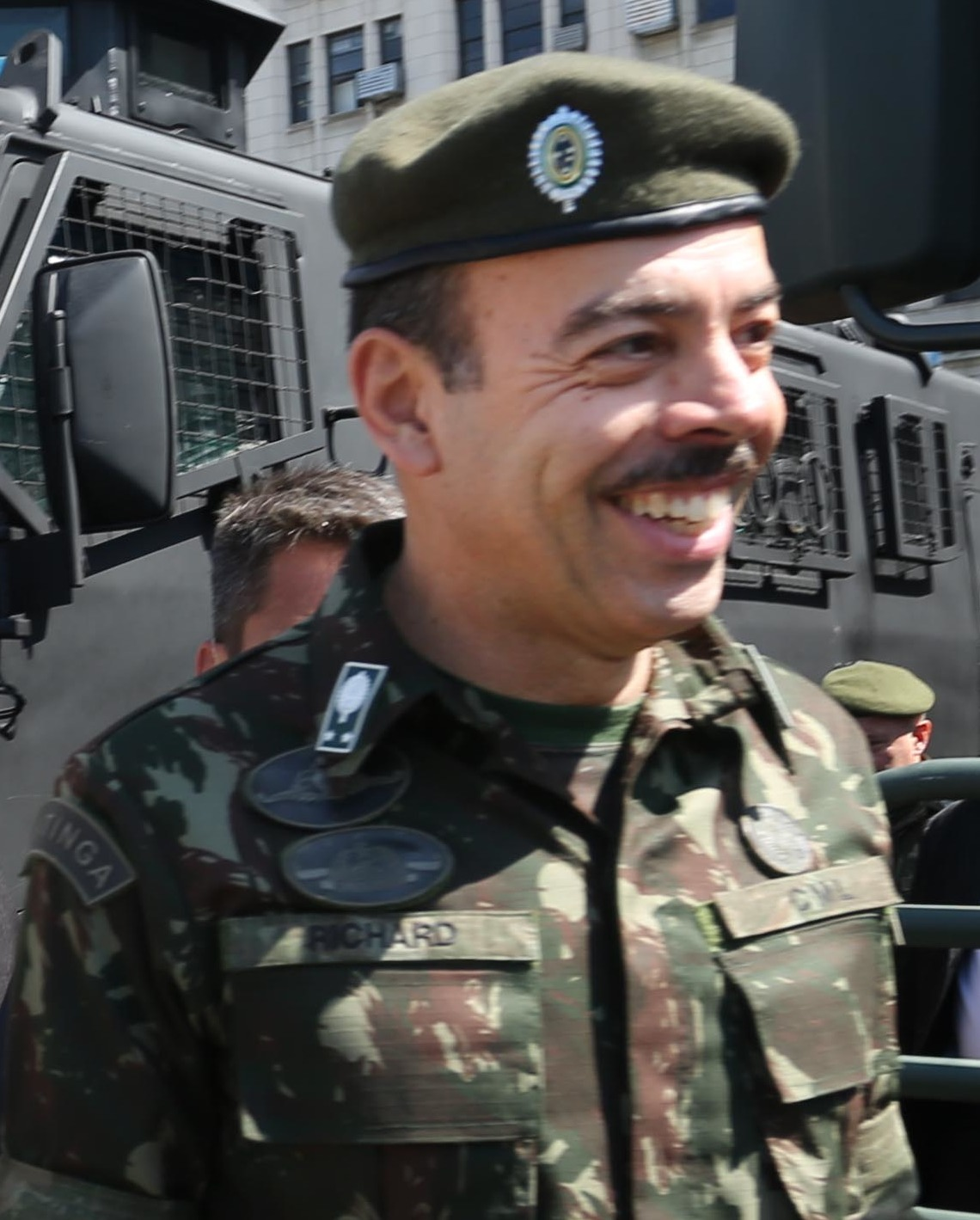 Rio de Janeiro - 28-03-2018 - Solenidade de entrega de viaturas blindadas à Secretaria de Segurança do Estado do Rio de Janeiro.Foto: Carlos Magno